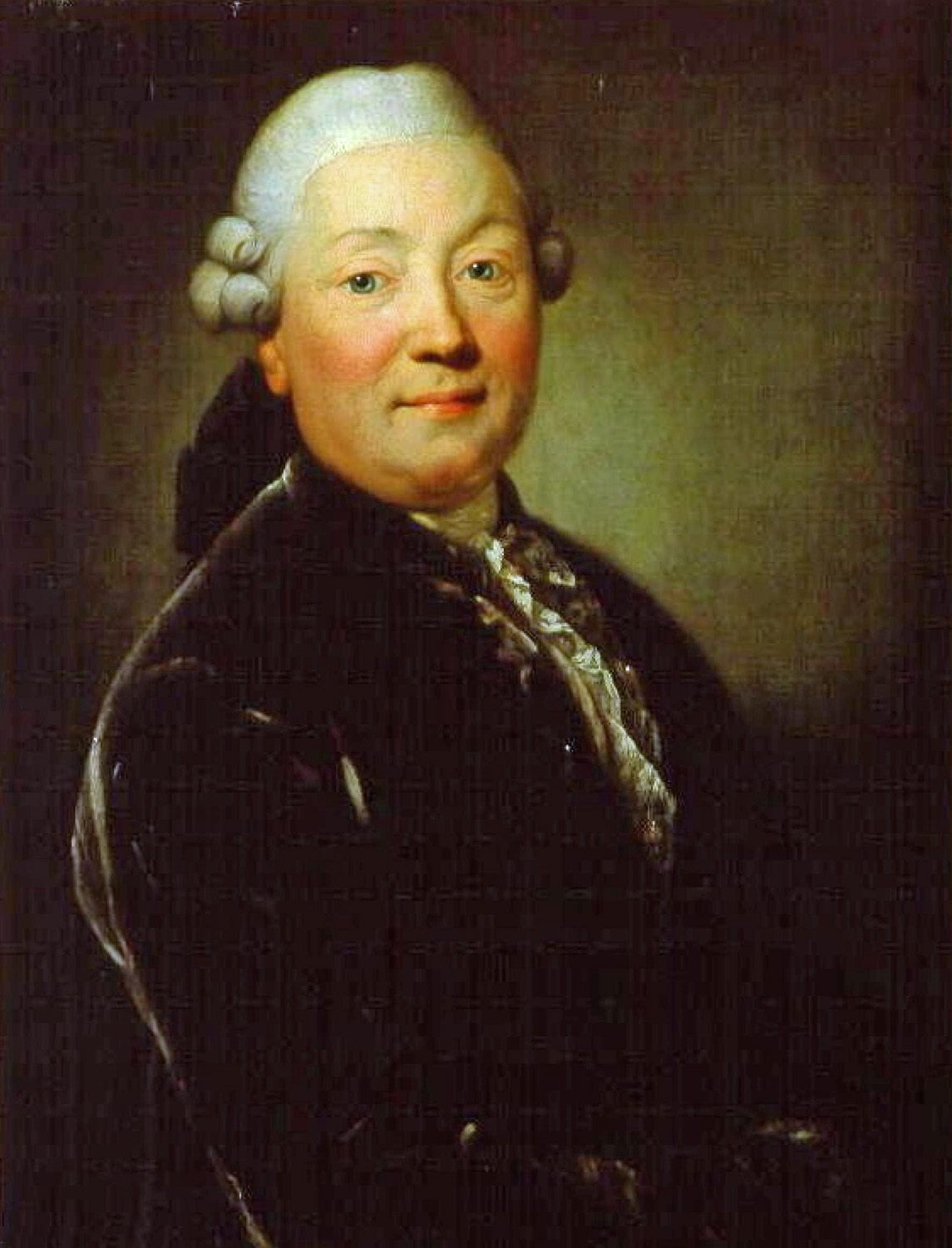 Der Leipziger Bürgermeister Adolph Christian Wendler (* 1734; † 1794) auf einem Gemälde von Anton Graff.